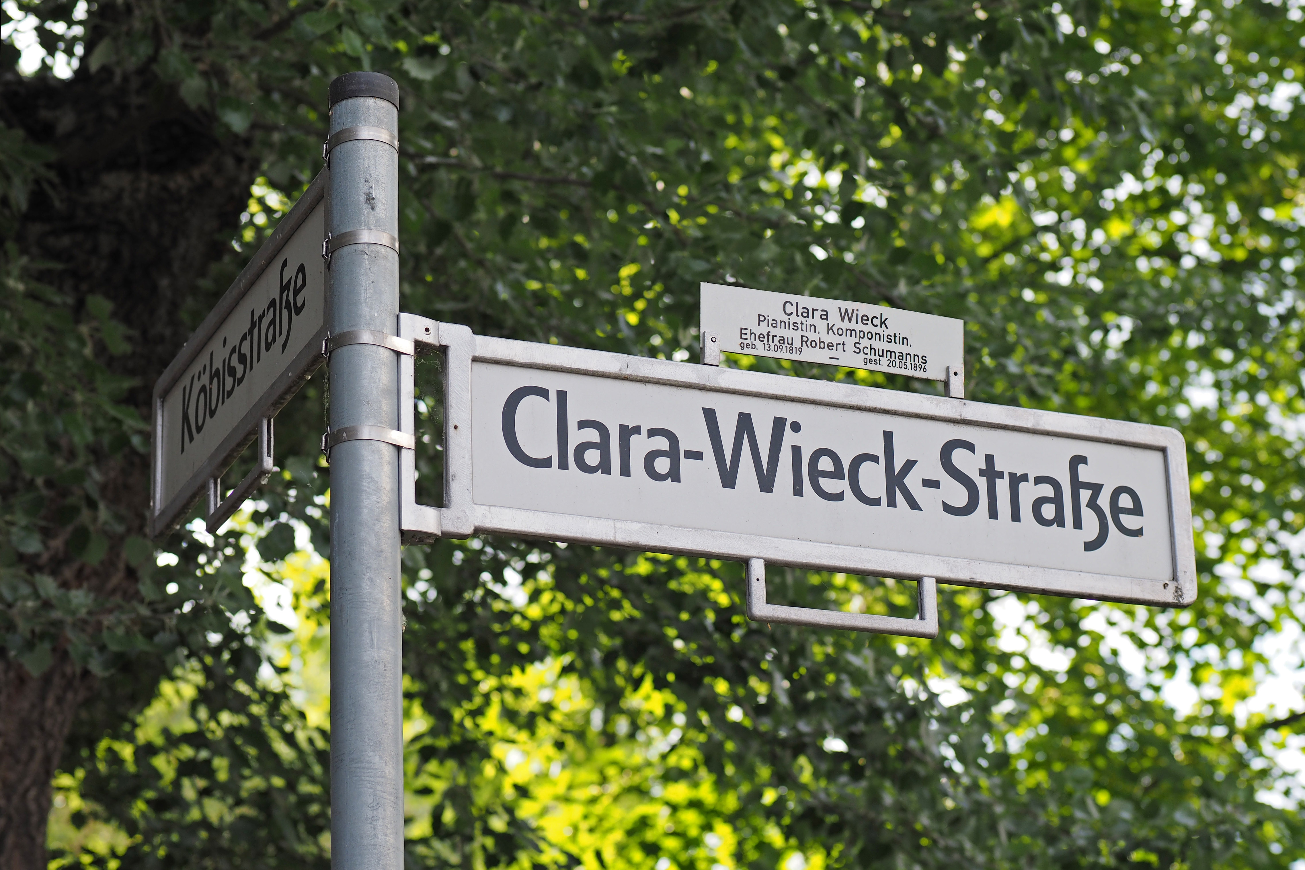 Straßenschild Clara-Wieck-Straße Ecke Köbisstraße, Berlin